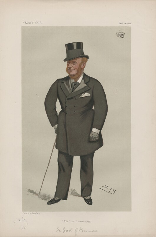 Lord Kenmare